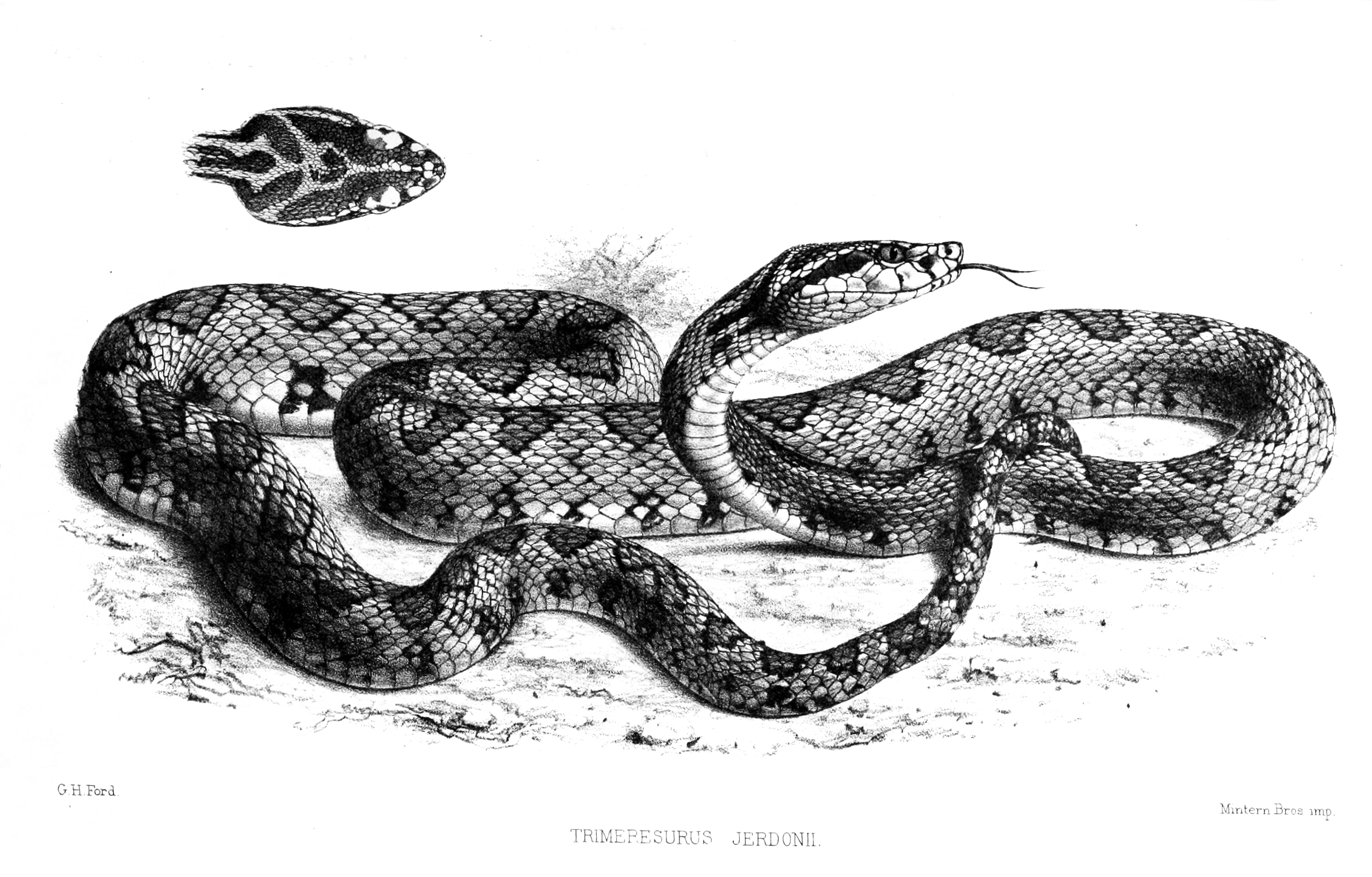 Trimeresurus jerdoni